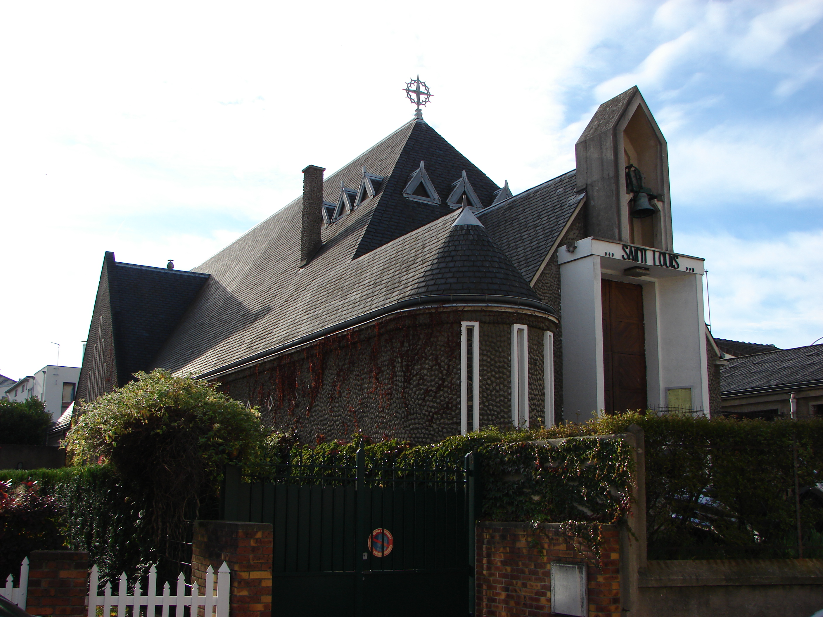 Église Saint Louis située au 83 rue Voltaire à Suresnes